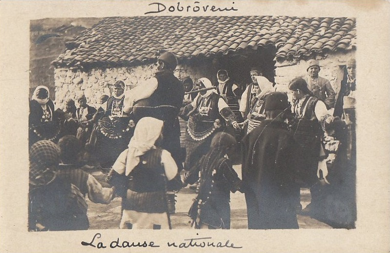 Добровени през Първата световна война.